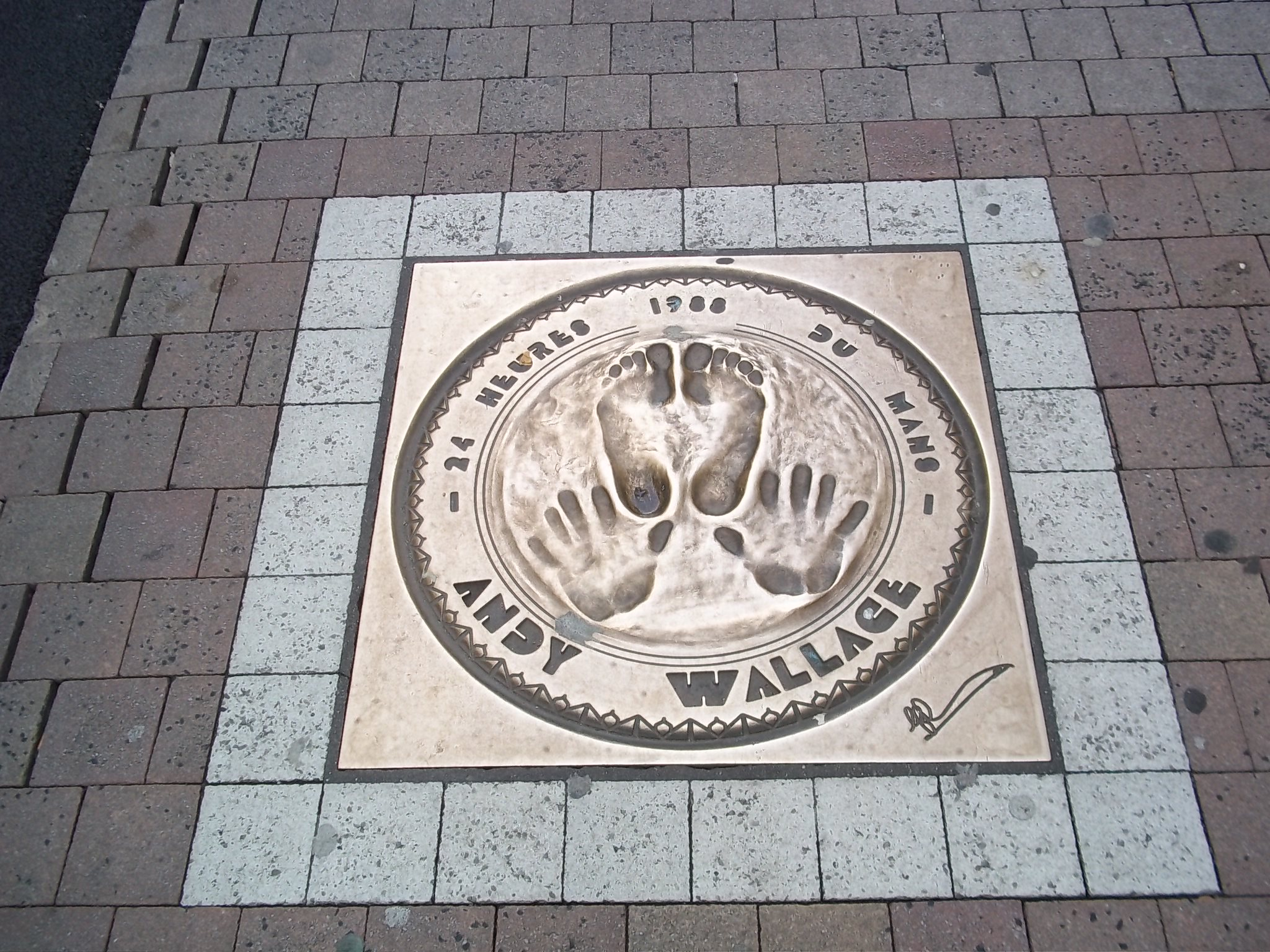 Plaque de bronze des empreintes de Wallace